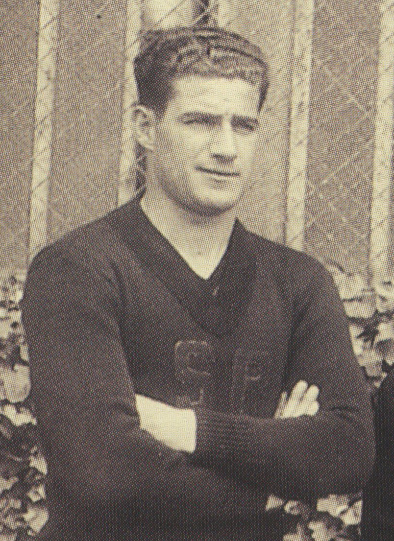 Le joueur du Stade rennais Carlos Volante avant la finale de la Coupe de France 1935.